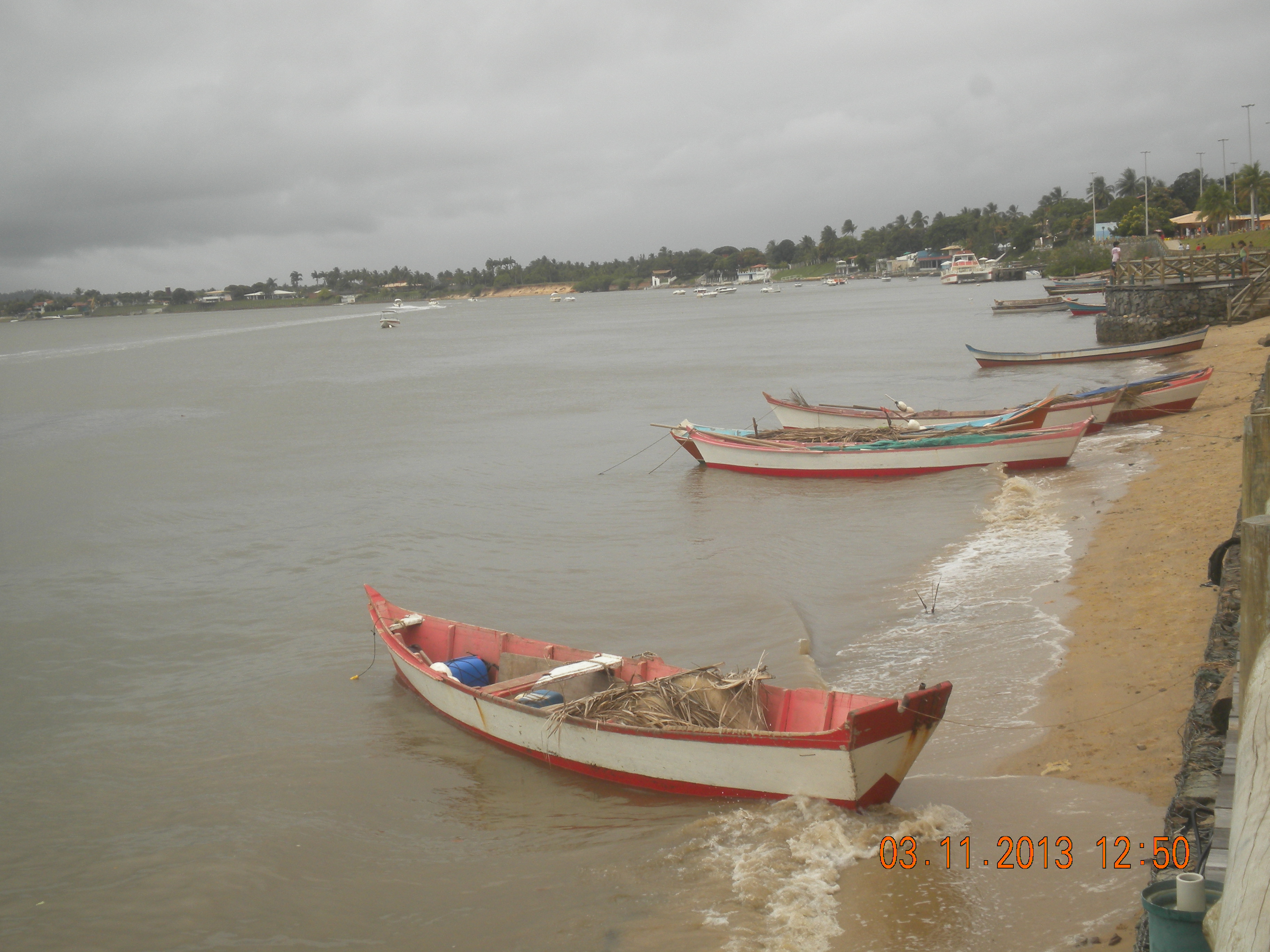 Também conhecida como Orla Por do Sol local de plena natureza, prática de Stand Up Paddle em Aracaju